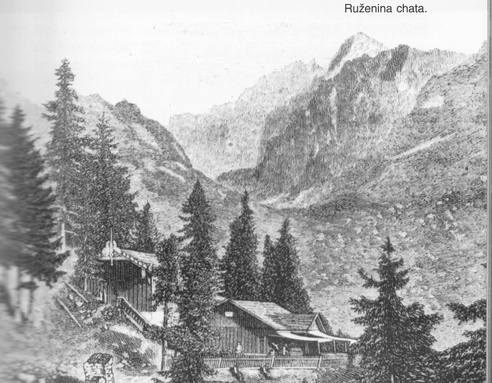 Zhorená Ruženina chata na Hrebienku vo Vysokých Tatrách